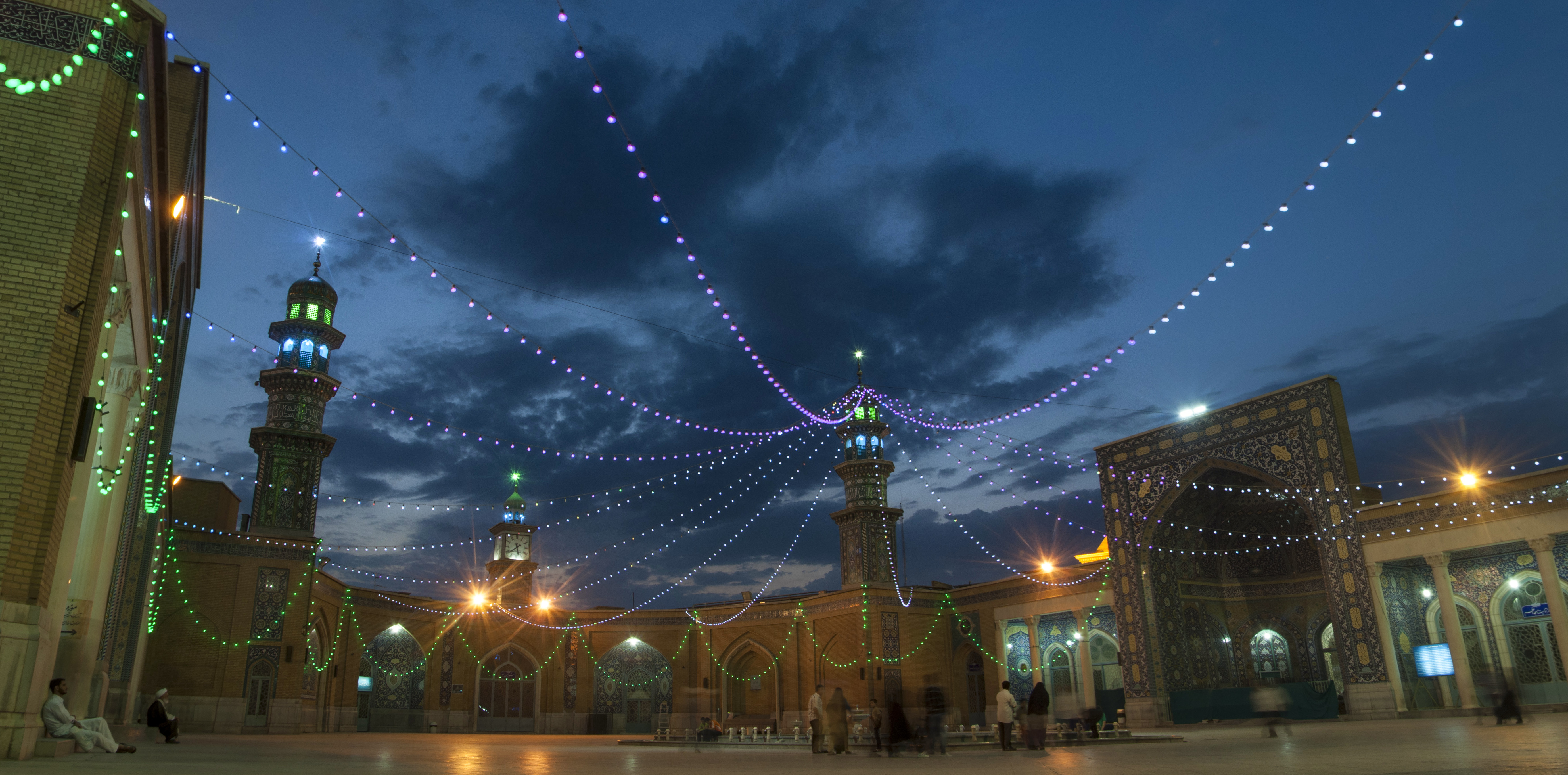 مسجد اعظم قم